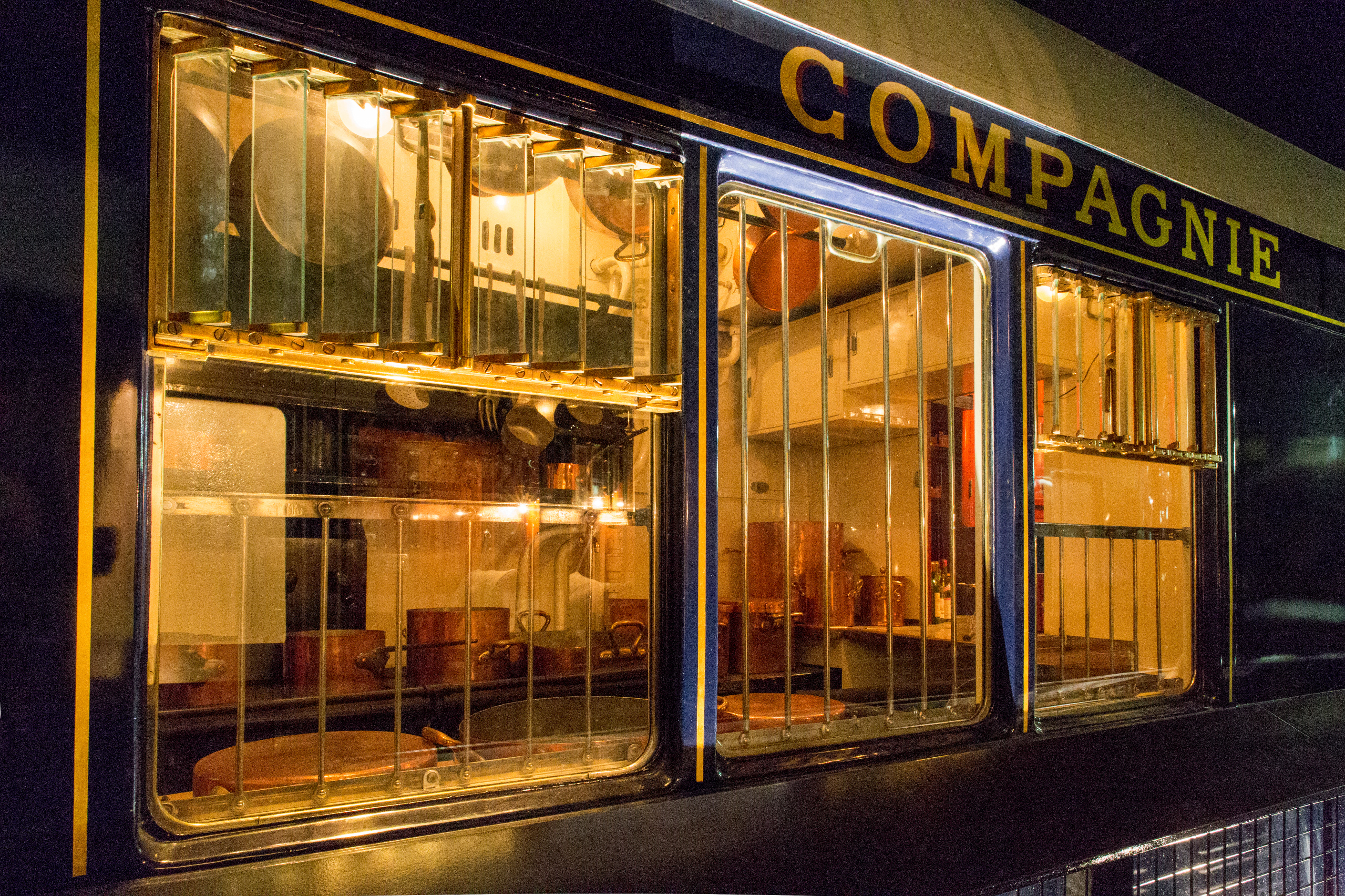 Vue des cuisines de la voiture-restaurant CIWL 3348.